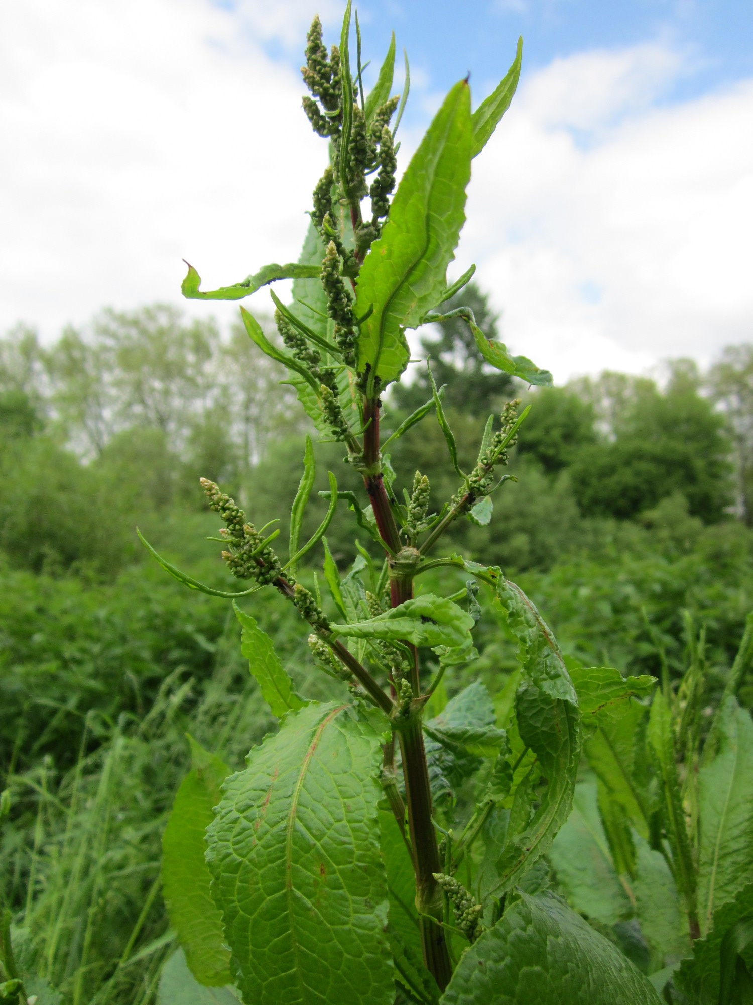 Stumpfblättriger Ampfer (Rumex obtusifolius) an der Saar in Saarbrücken